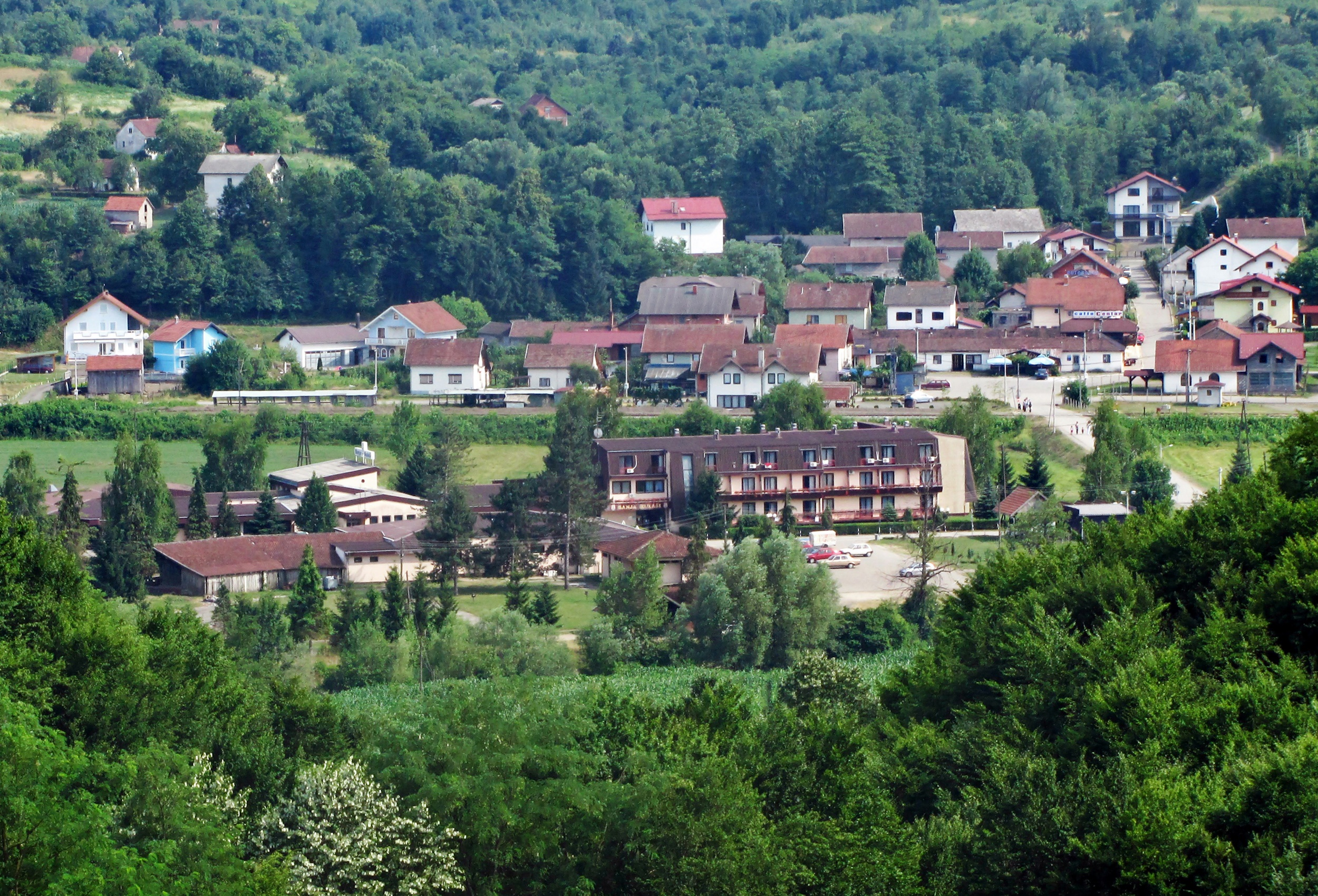 Кулаши